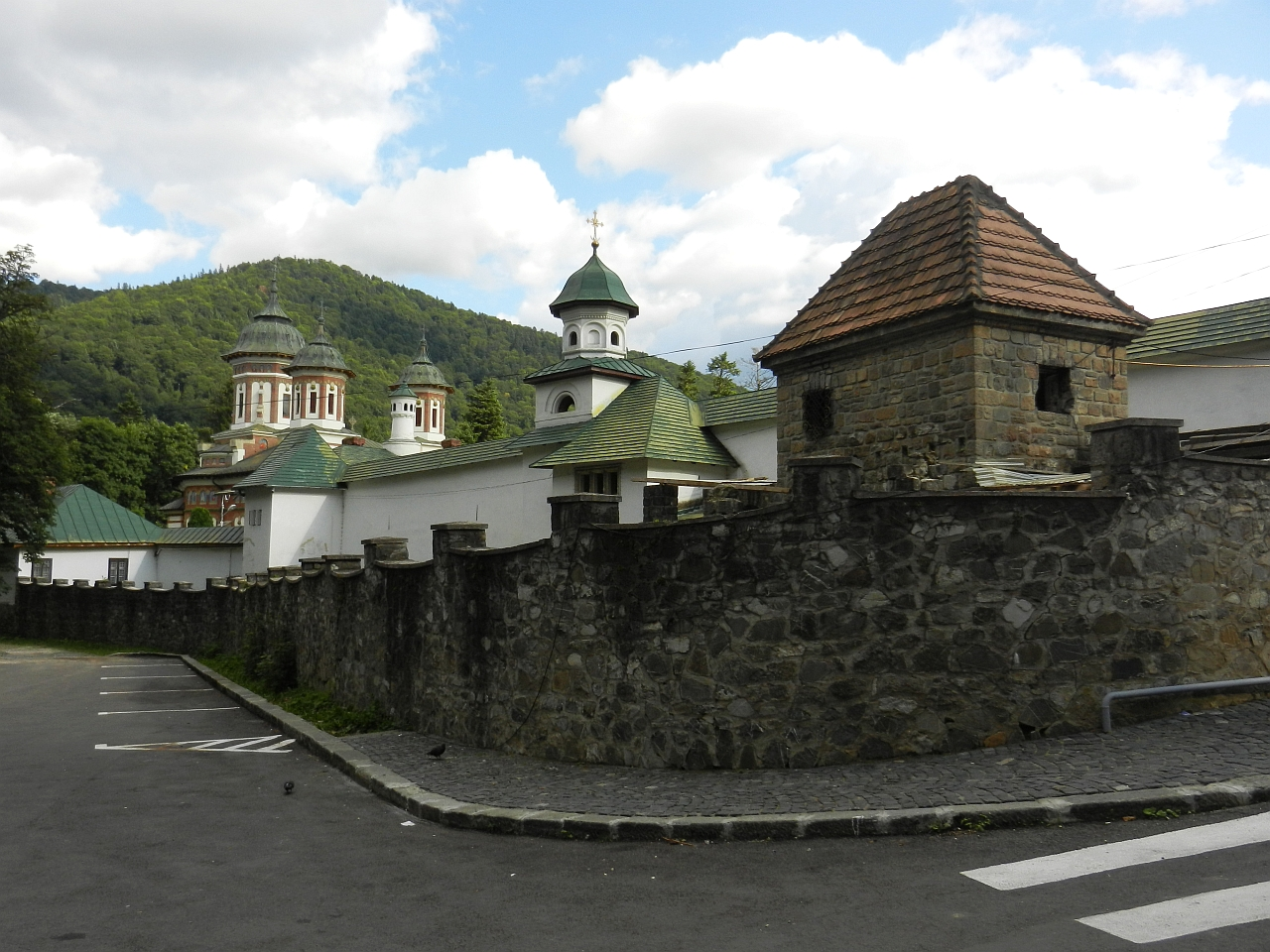 Zidul incintei vechi 05